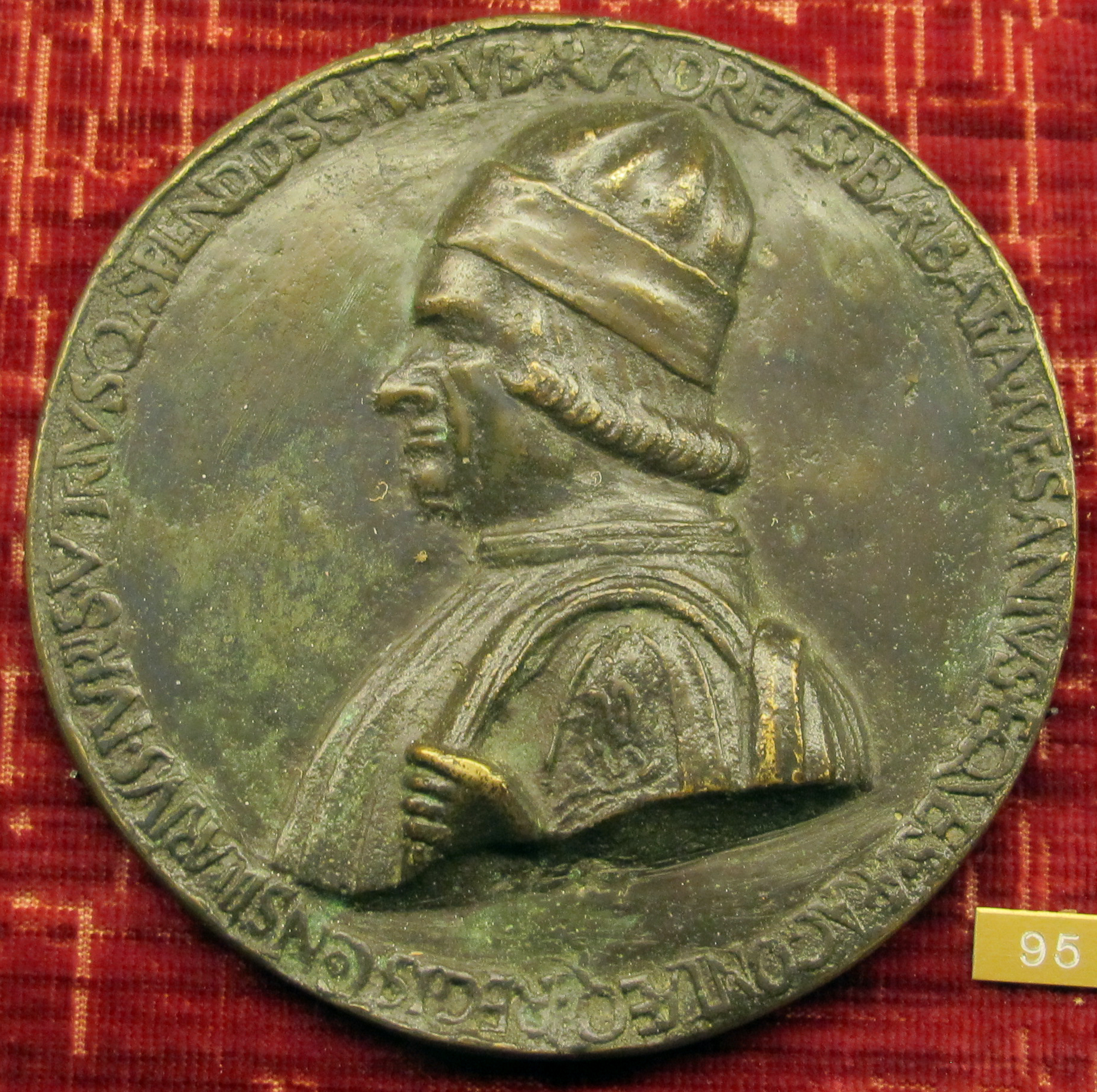 Sperandio savelli, medaglia di andrea barbazza di messina, giusista